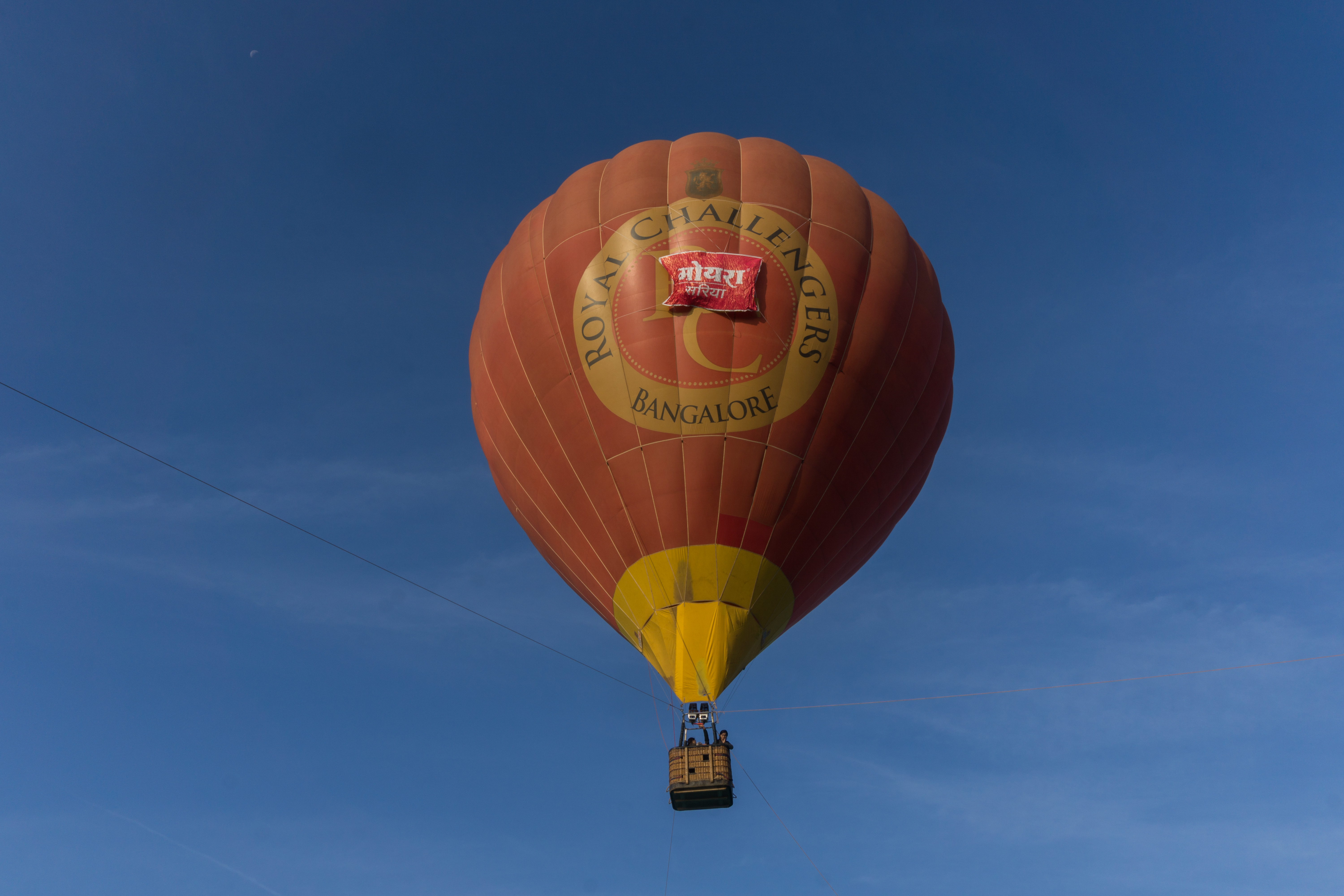 Gas Balloon at Jal Mahotsav - Hanuwantiya, Madhya Pradesh